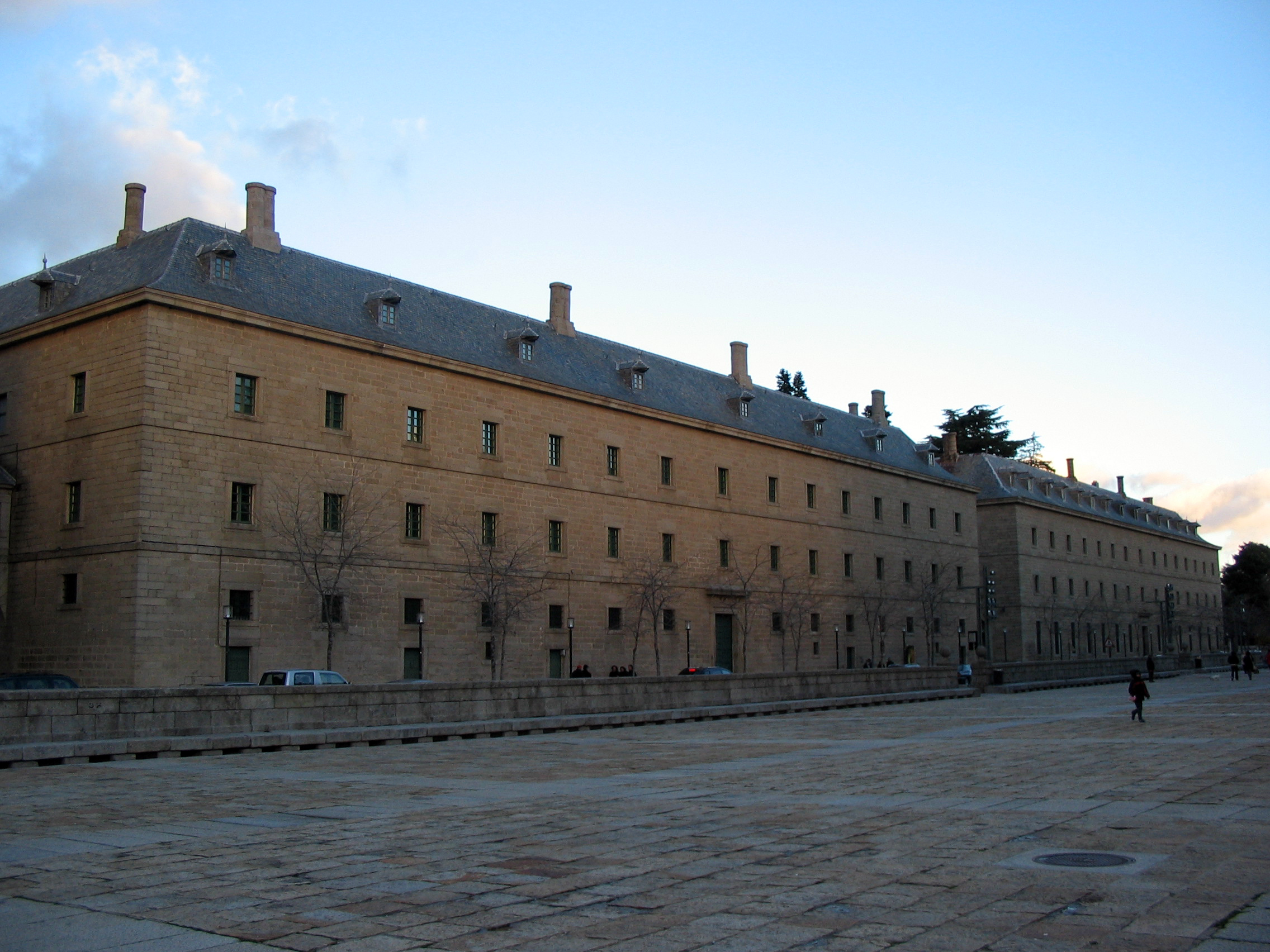 San Lorenzo de El Escorial: Casas de Oficios, de Juan de Herrera. A la izquierda la denominada Segunda Casa de Oficios, y a la derecha La Primera Casa de Oficios.